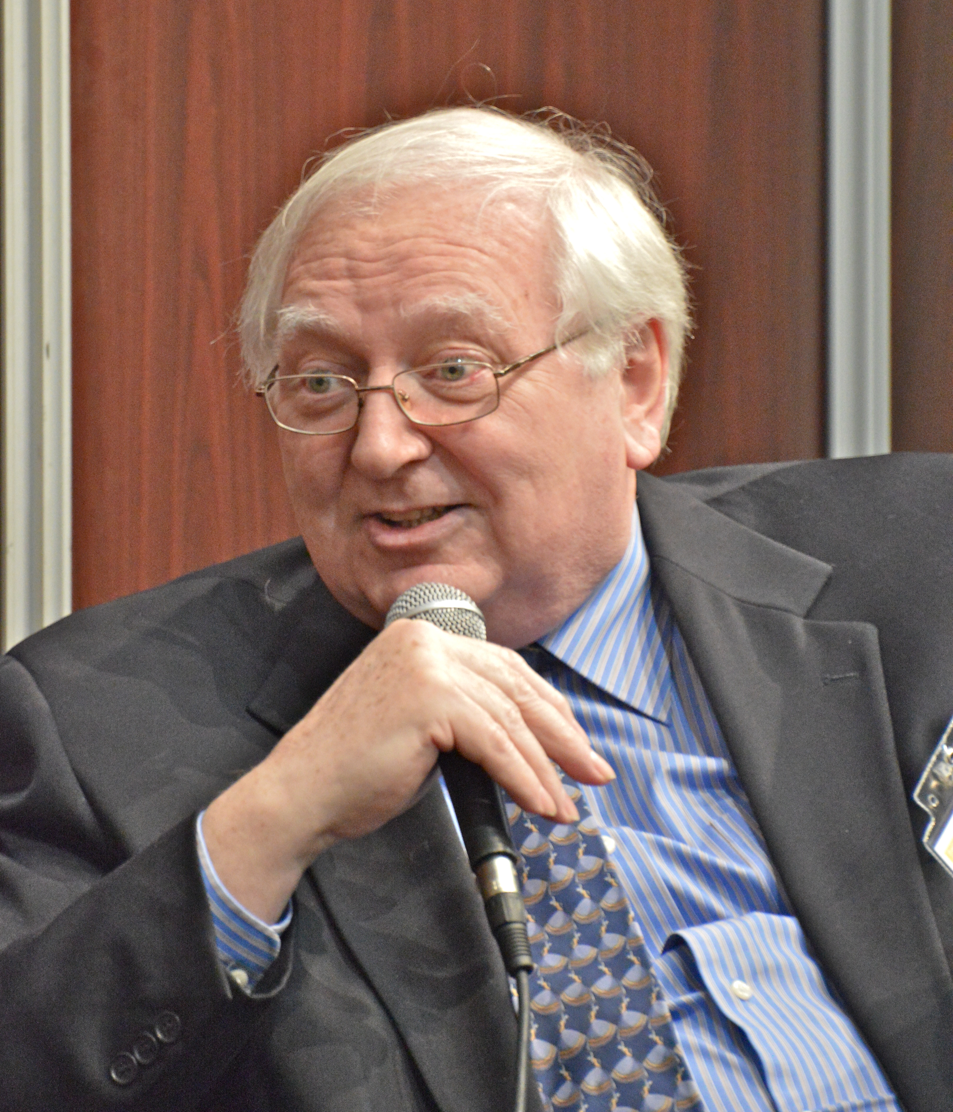 Richard Le Hir au Salon international du livre de Québec 2013